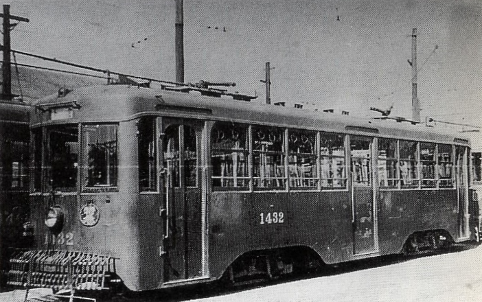 戦時中に実施された名古屋市電の特急運転